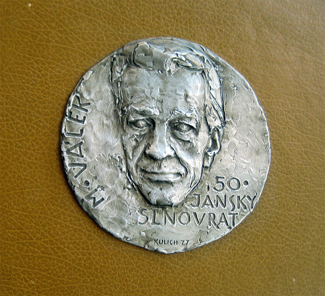 Medaila Významného slovenského básnika Miroslava Váleka